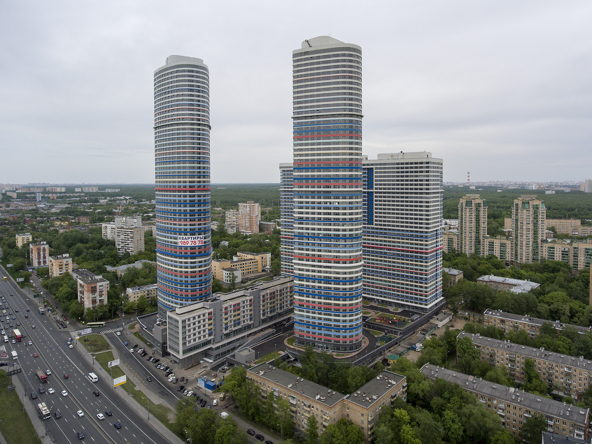 ЖК «Триколор» в Ростокино